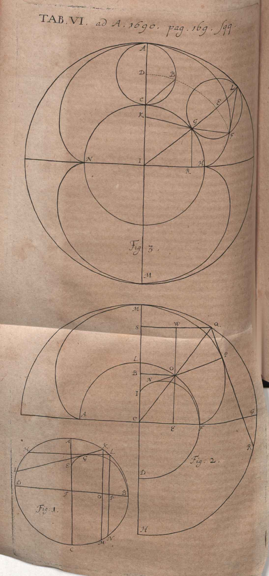 Illustration